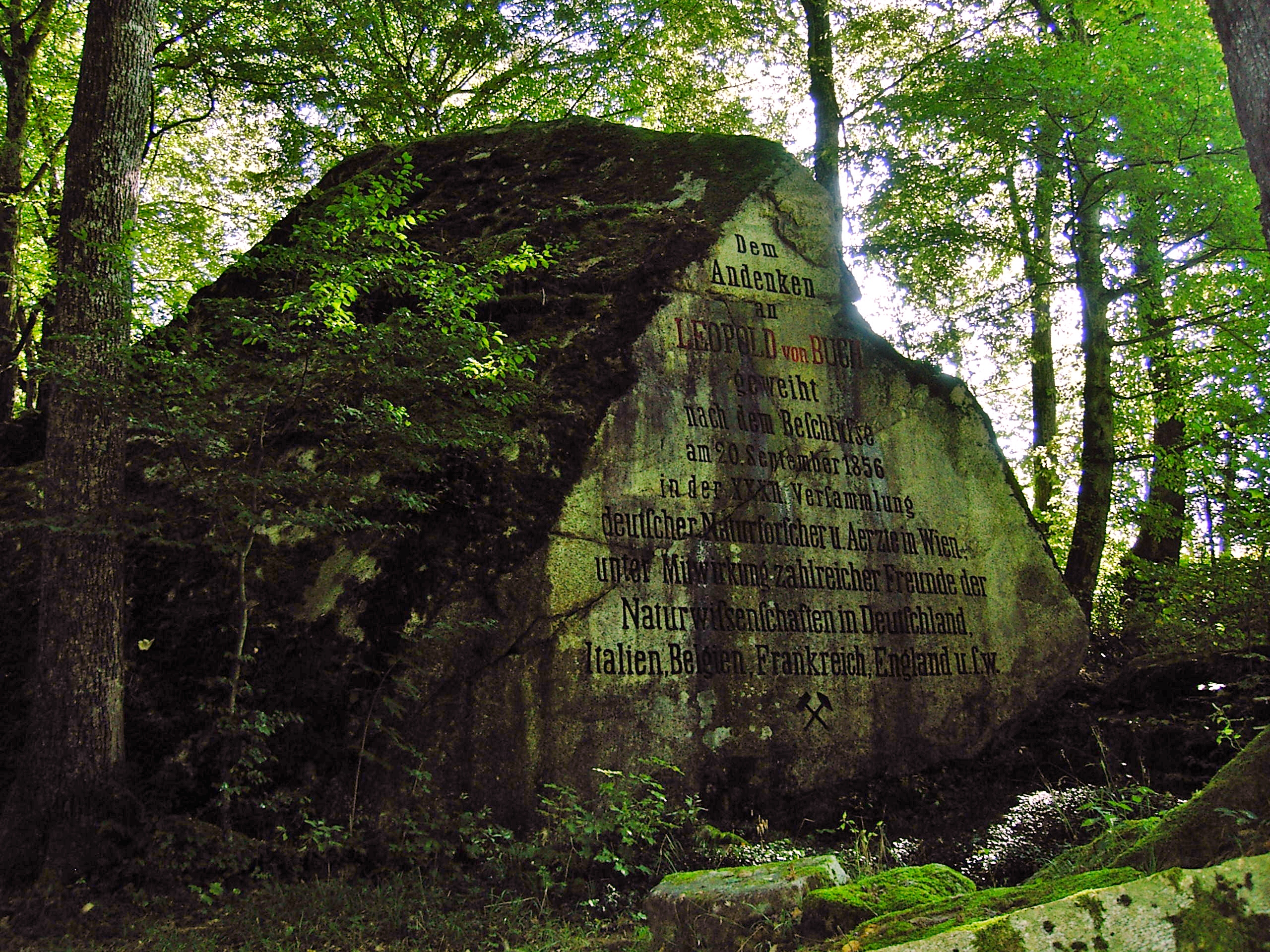 Großraming Leopold Buch Denkmal Pechgraben, dieses Denkmal ist mehrere Meter hoch